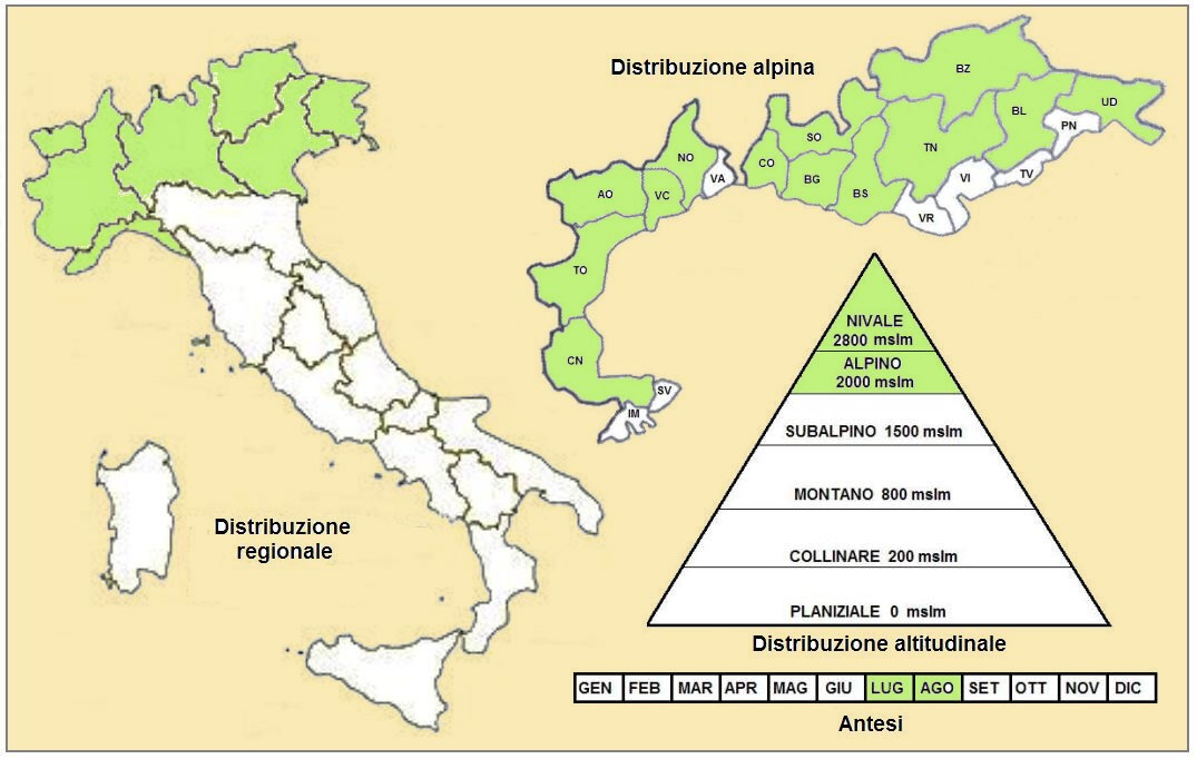 Ranunculus glacialis - Distribuzione